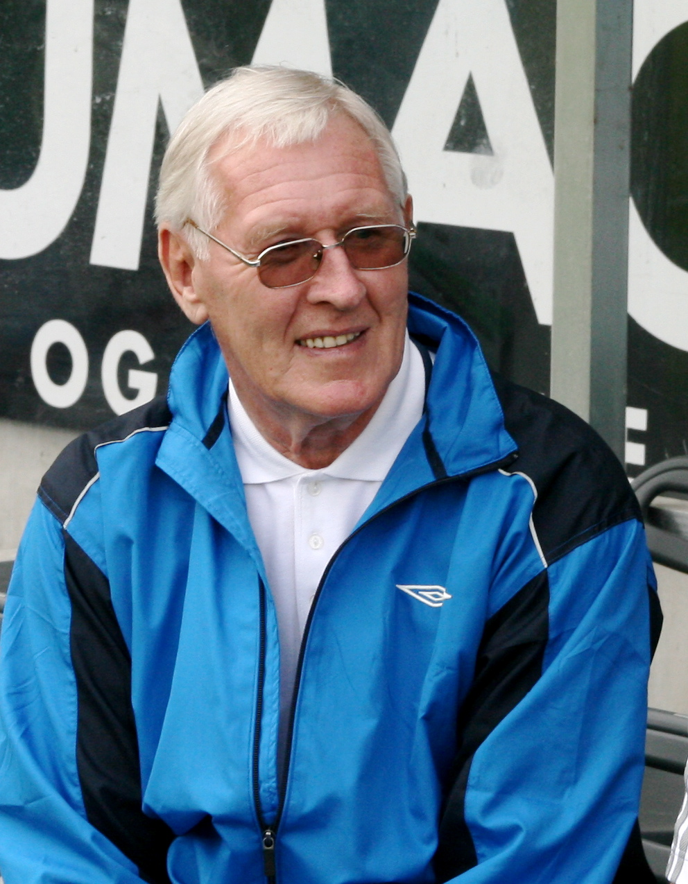 Tony Knapp under kampen til Viking All Stars mot Liverpool Legends på Viking stadion 10 juli 2008.